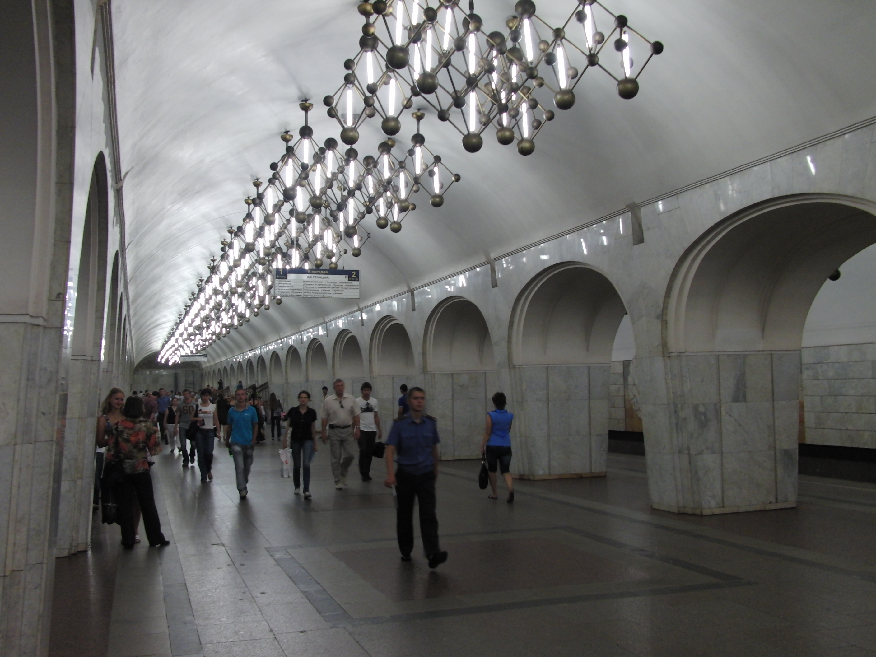 Mendeleevskaya